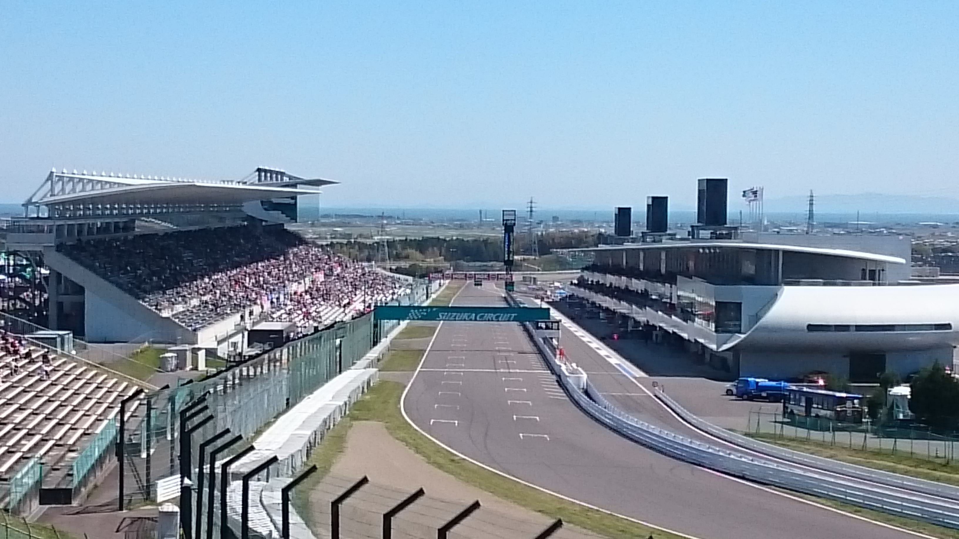 鈴鹿サーキット メインストレート